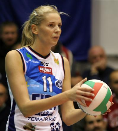 Agata Mróz - polska siatkarka